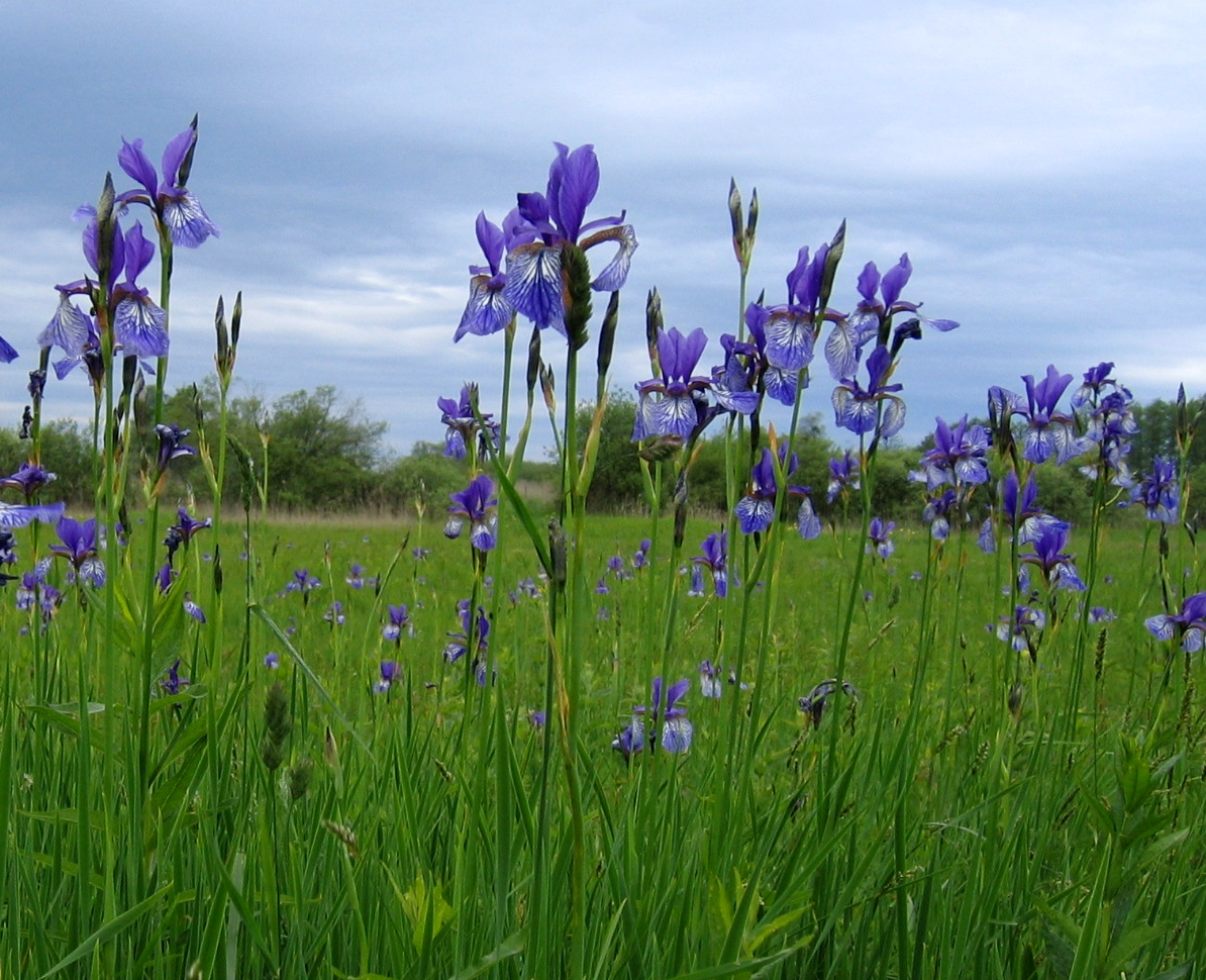 Sibirische Schwertlilie (Iris sibirica) in den Streuwiesen im "Eriskircher Ried" (als Naturschutzgebiet ausgewiesen seit 1939) in Eriskirch.